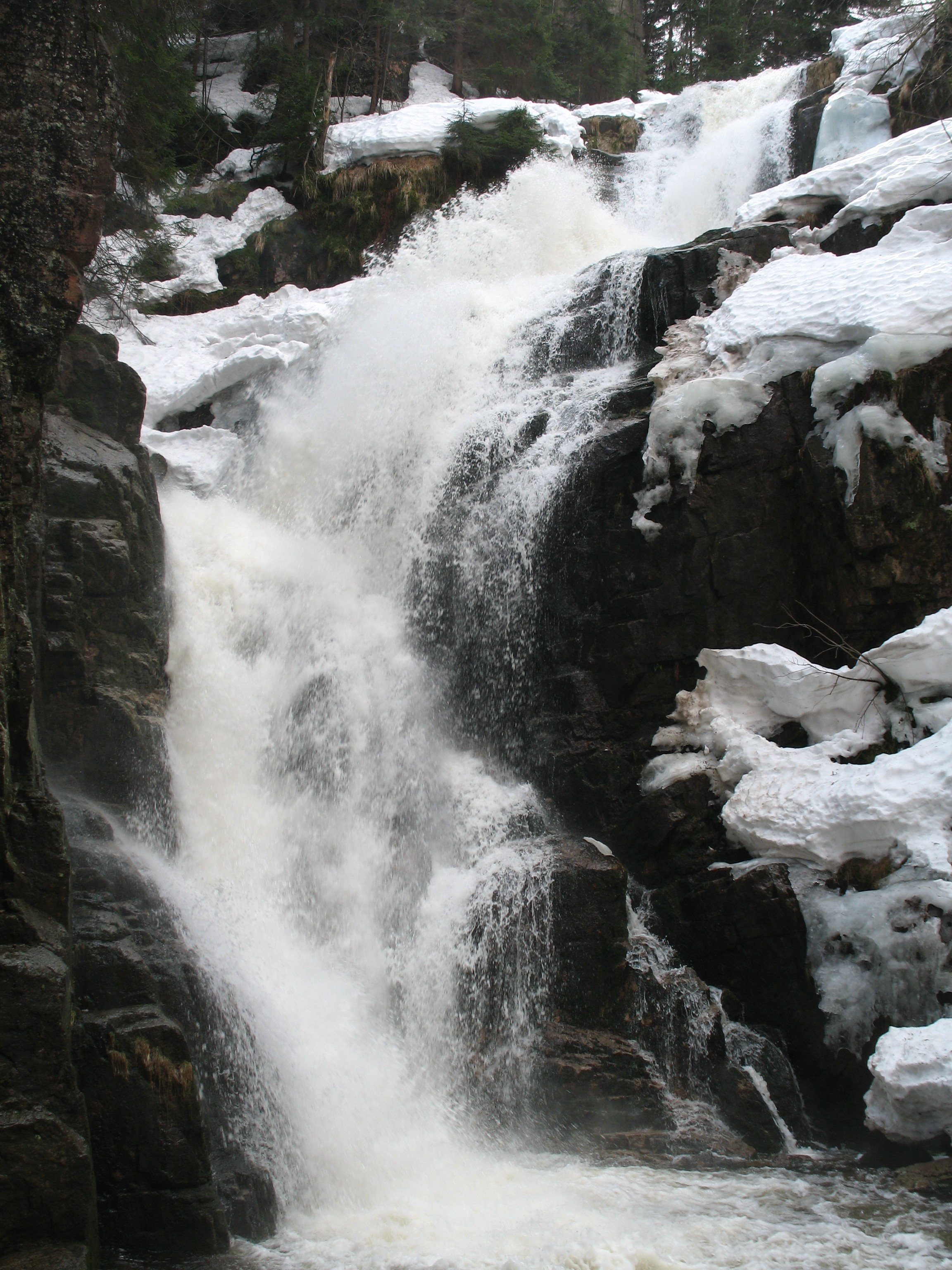 Wodospad Kamieńczyk w czasie roztopów.